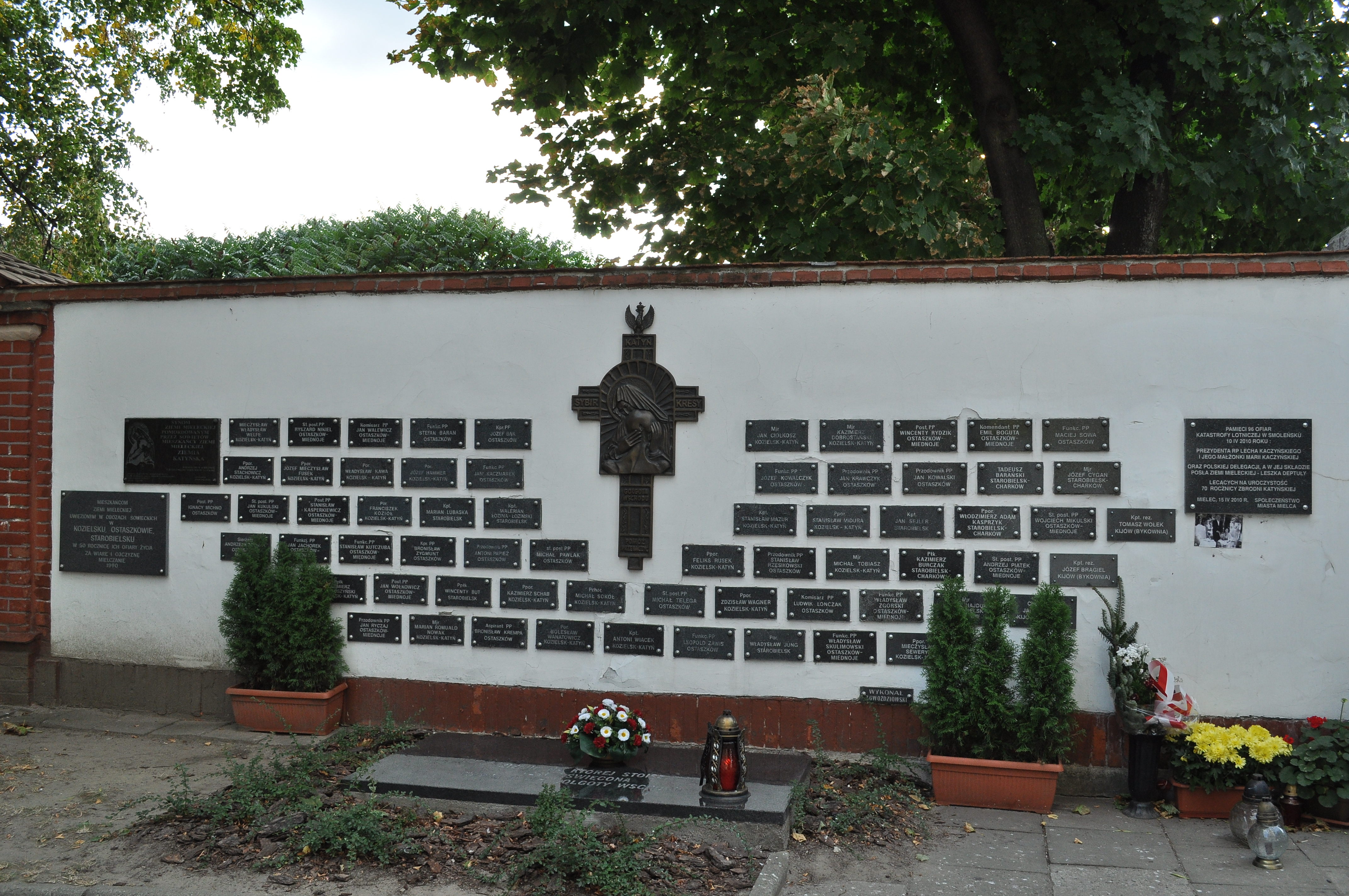 Bazylika św. Mateusza Apostoła i Ewangelisty w Mielcu, ogrodzenie - Ściana Katyńska